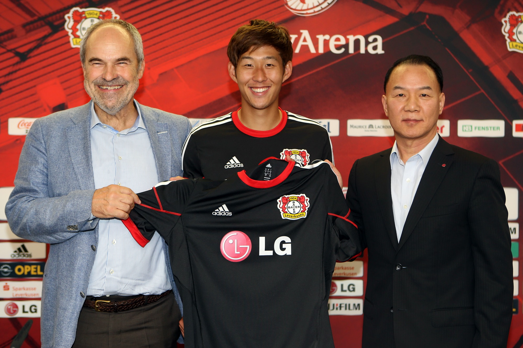 LG전자가 독일 프로축구 분데스리가의 명문 클럽 '바이엘 04 레버쿠젠'을 공식 후원한다. 29일(독일 현지시간) 팀구장 '바이 아레나'에서 열린 조인식에서 (왼쪽부터) 볼프강 홀츠호이져(Wolfgang Holzhauser)단장, 손흥민 선수, LG전자 글로벌마케팅부문장 김기완 부사장이 'LG'로고가 새겨진 셔츠를 들고 기념촬영을 하고 있다. ※ LG전자 뉴스룸 에서 관련 보도자료를 확인하실 수 있습니다.